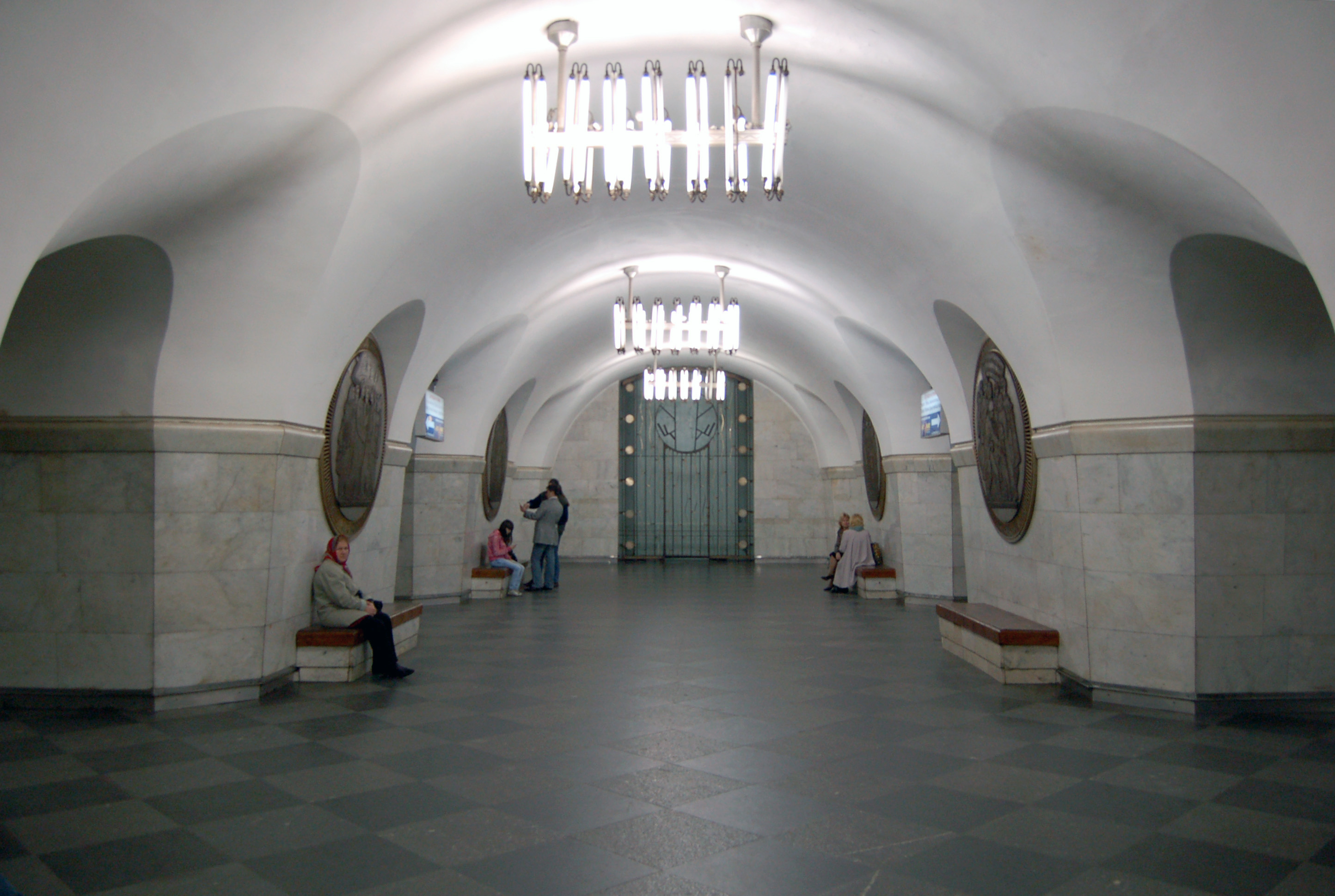 Станция метро «Вокзальная», центральный зал